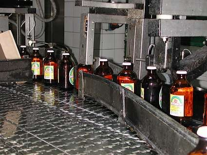 Brasserie de Bourbon brewery